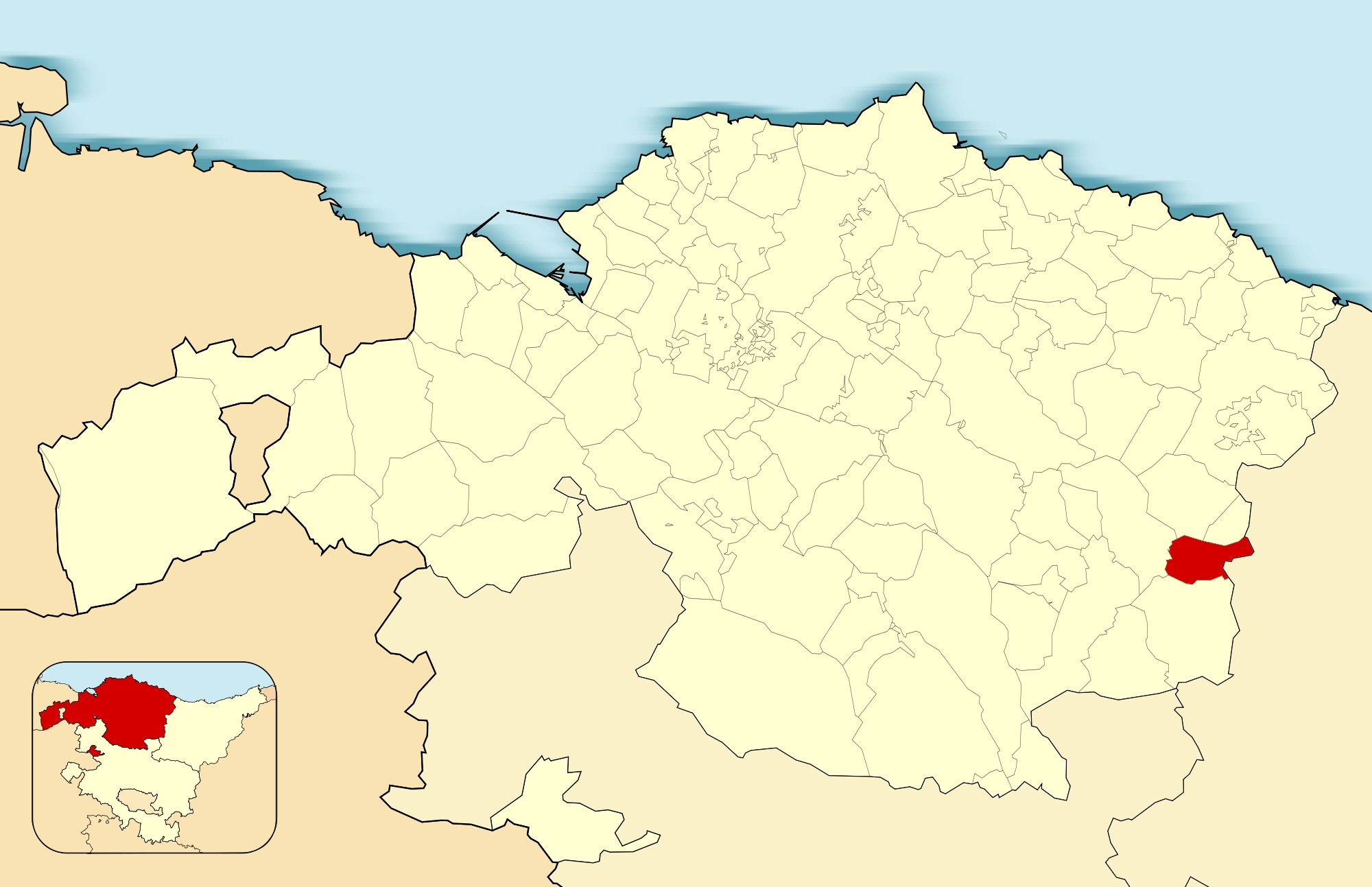 Locator Zaldibar